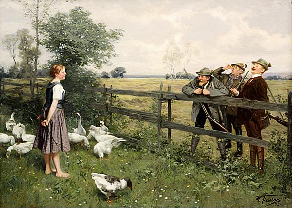 Gänselieschen auf einer Sommerwiese im offensichtlich humorvollem Gespräch mit drei Jägern am Gartenzaun